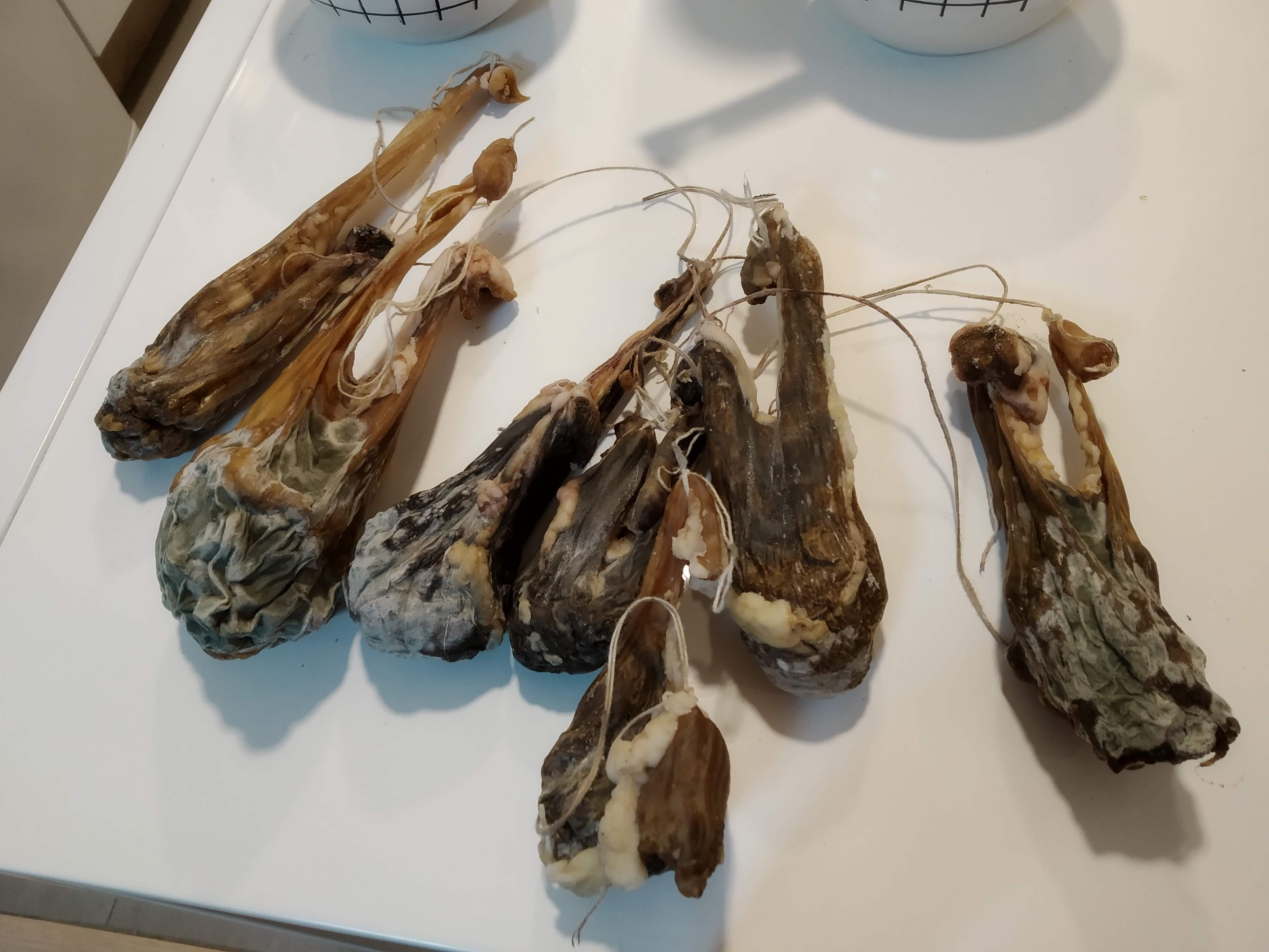 Legar edo gatzagiak. Gatzatu edo mami naturala egiteko behar den produktua.